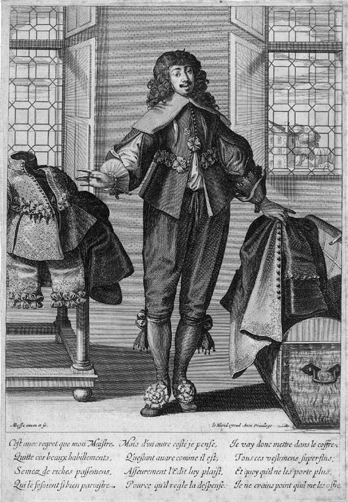 Abraham Bosse: Le valet de chambre / Der Kammerdiener